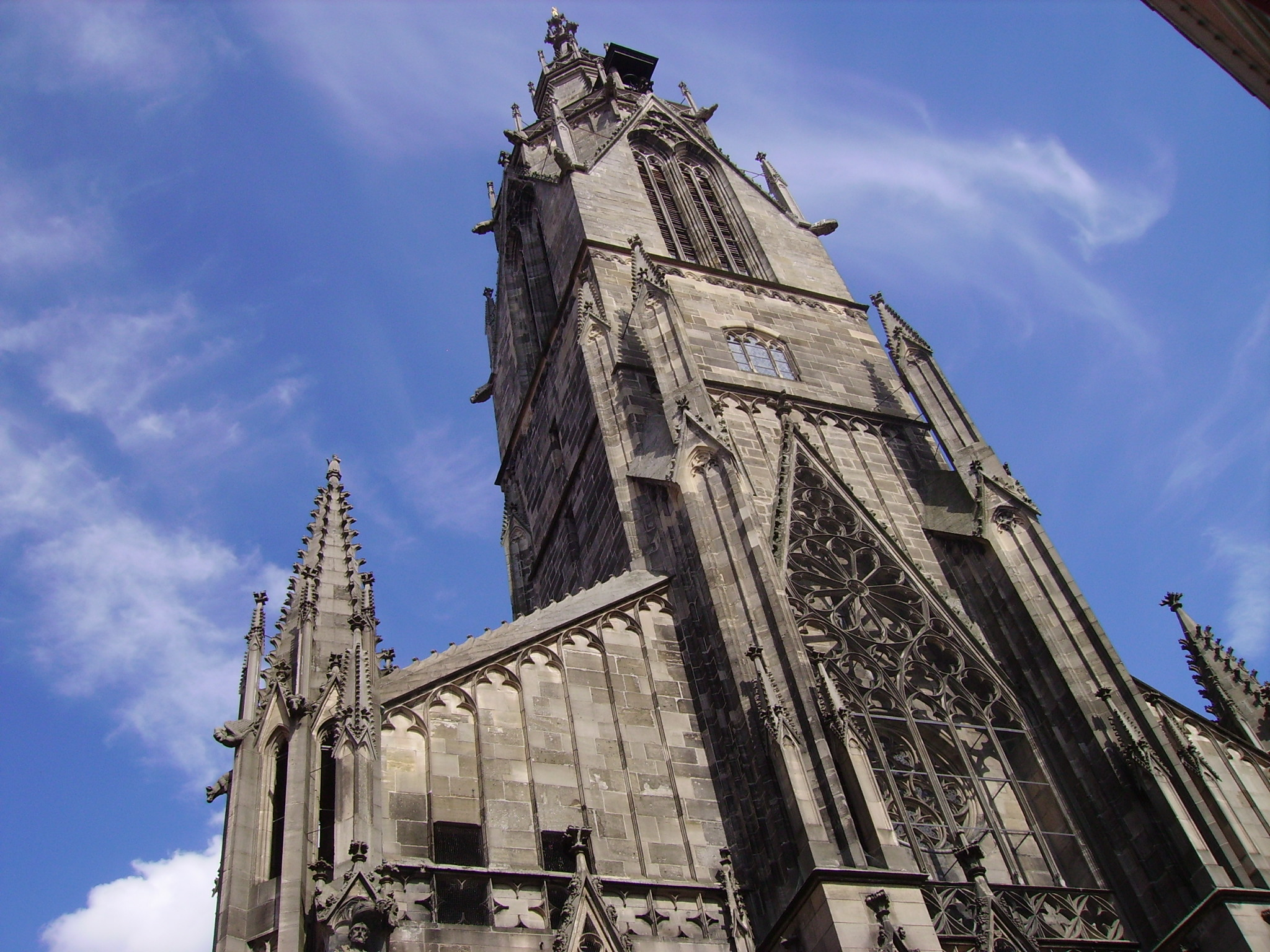 Blick von unten auf die Evangelische Marienkirche im Zentrum Reutlingen.